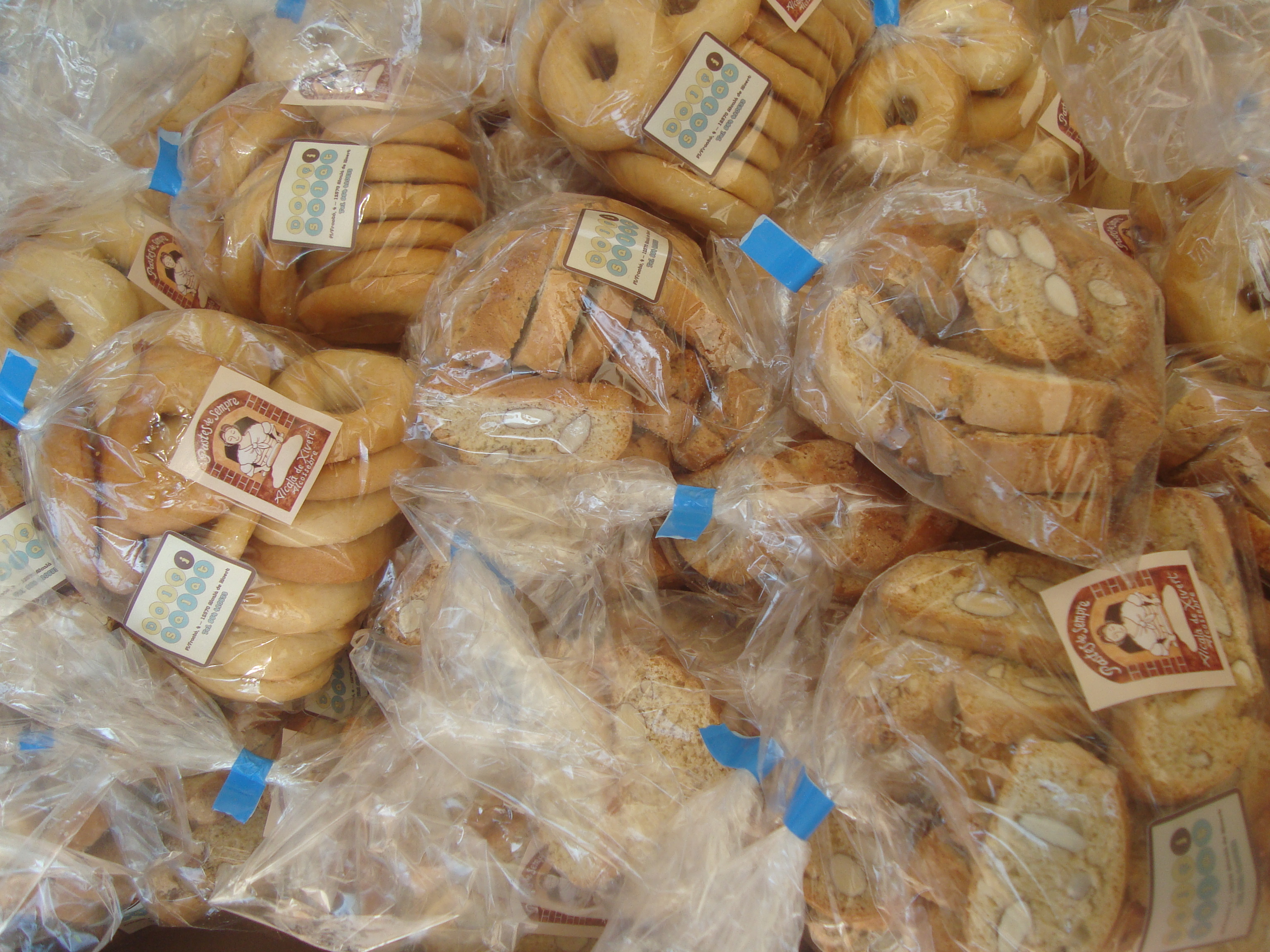 "Pastas de siempre de Alcalà de Xivert-Alcossebre"